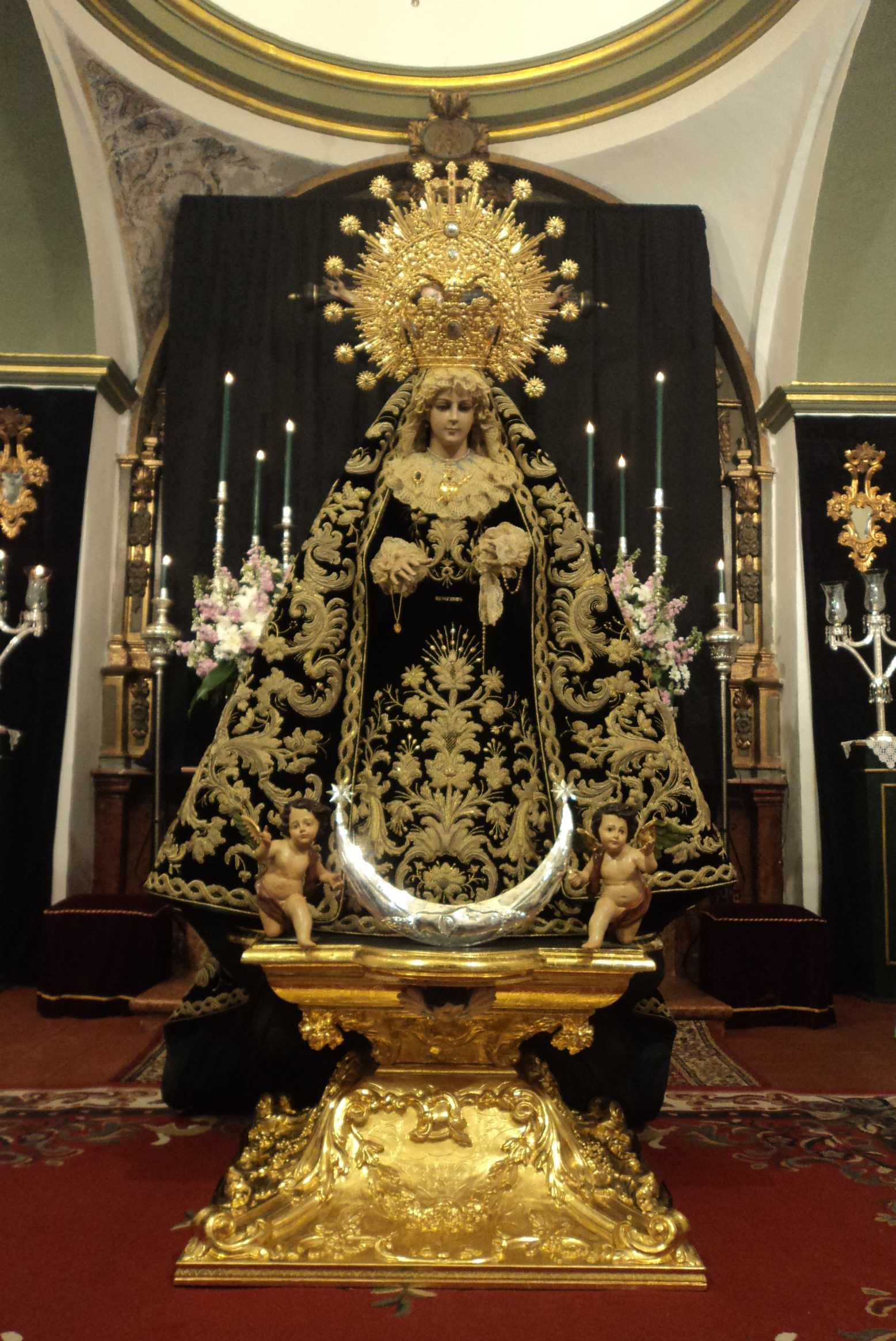 Besamanos celebrado tras los cultos de cuaresma. La Virgen luce su manto de procesión, estrenado el Jueves Santo de 1800